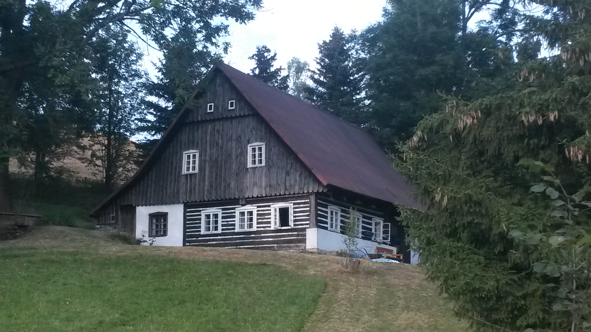 Dolní Lycečiny, dům č. 8